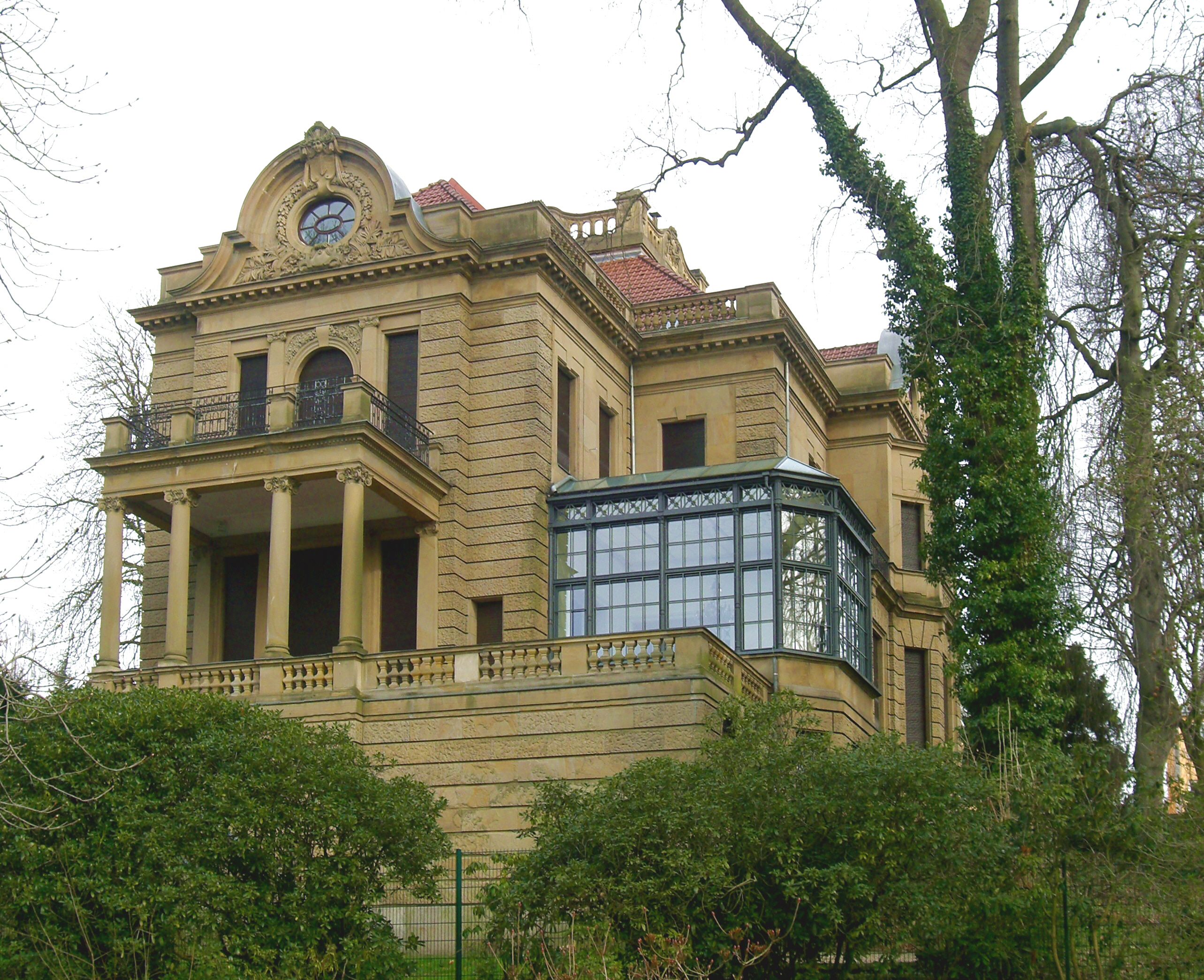 Villa Josef Thyssen This is a photograph of an architectural monument.